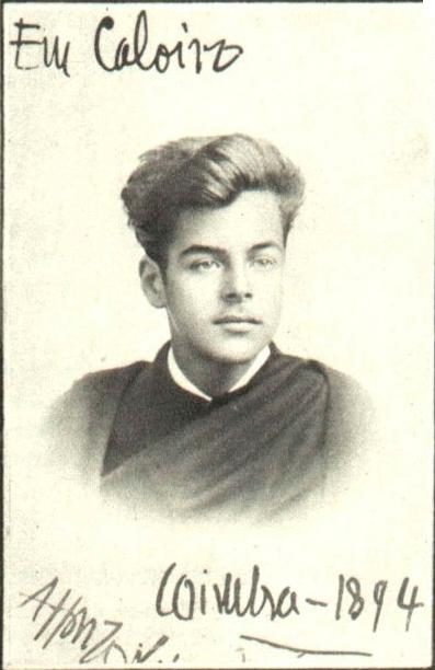 Photographie d'Afonso Lopes Vieira alors qu'il était étudiant à Coimbra en 1894.